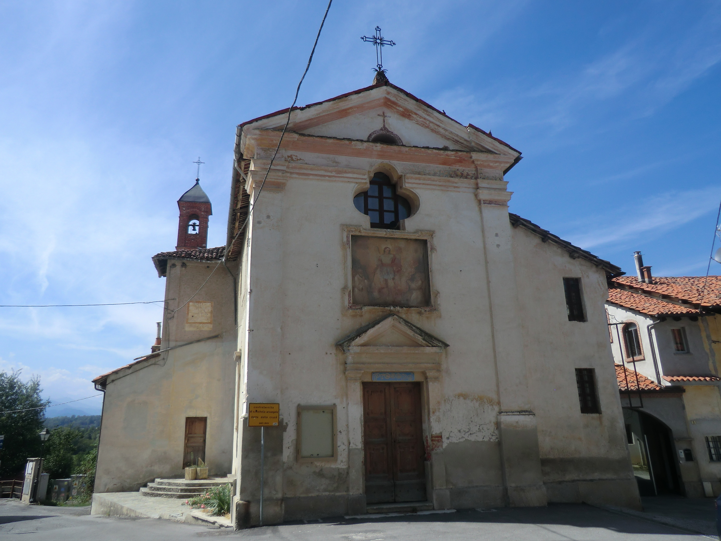 Pianfei (Cuneo): confraternita di San Michele Arcangelo (sec. XVII)